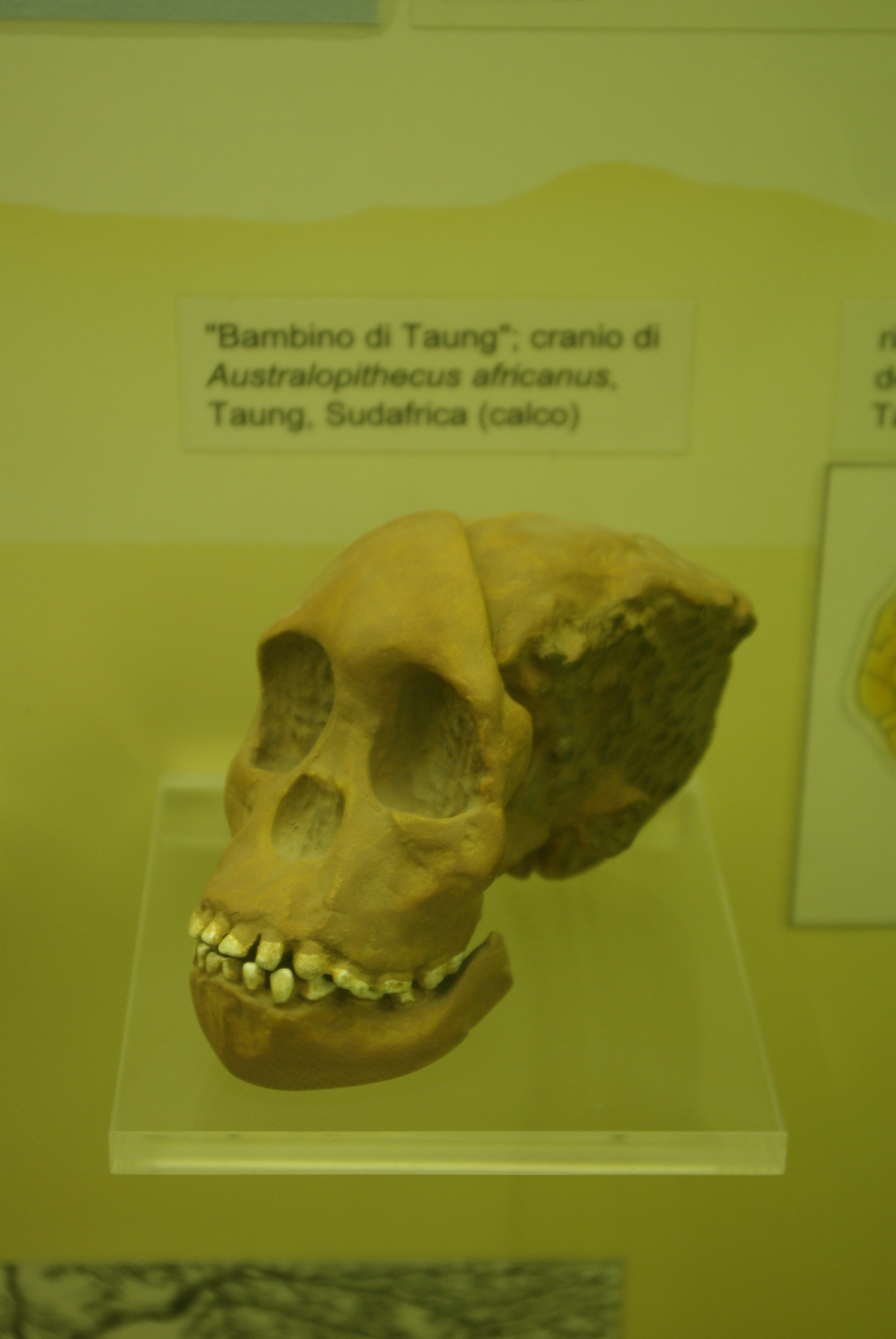 Museo civico di storia naturale This is a photo of a monument which is part of cultural heritage of Italy.